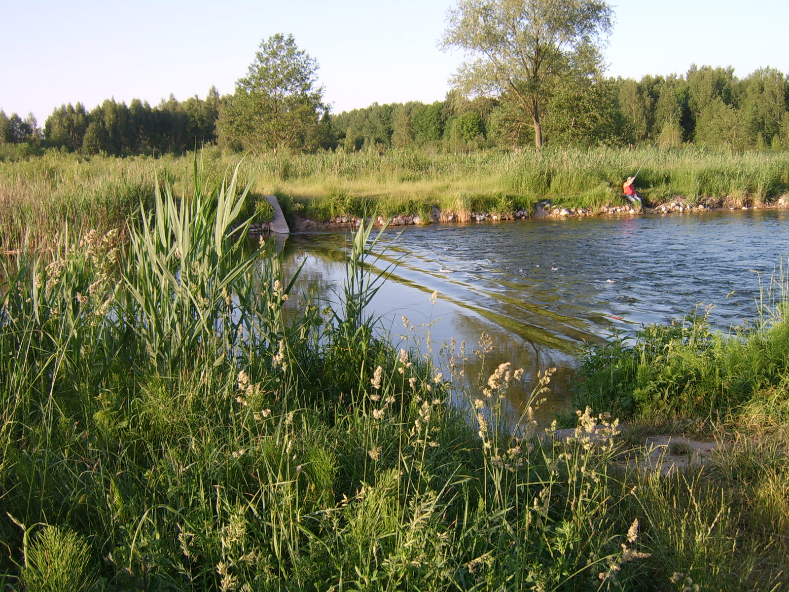 Spiętrzenie na rzece Białoławka